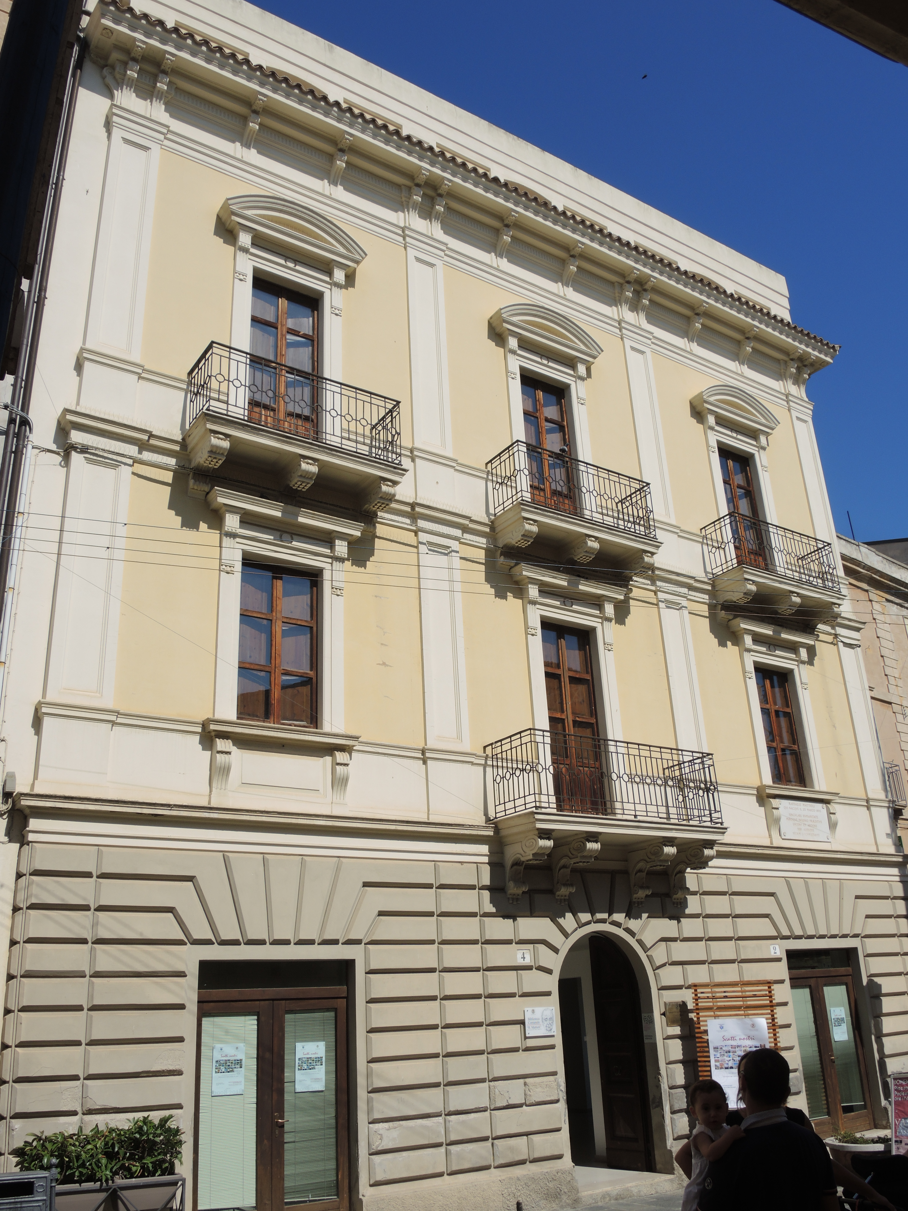 Palazzo Mattioli This is a photo of a monument which is part of cultural heritage of Italy.